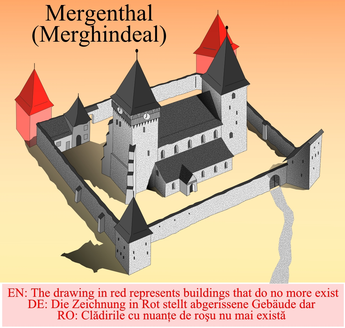 Biserica fortificata din Merghindeal v2